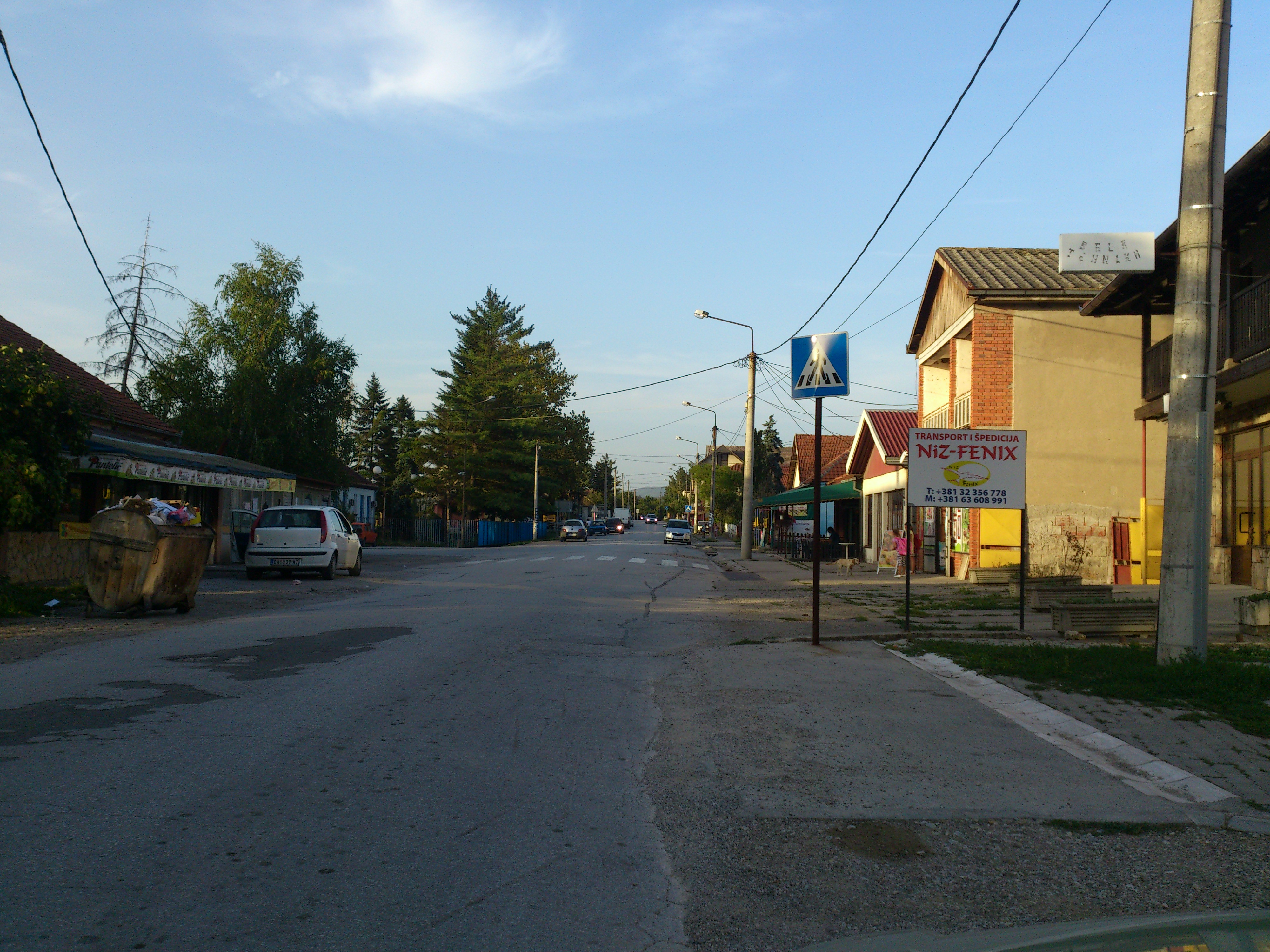 Варошица у Прељини.